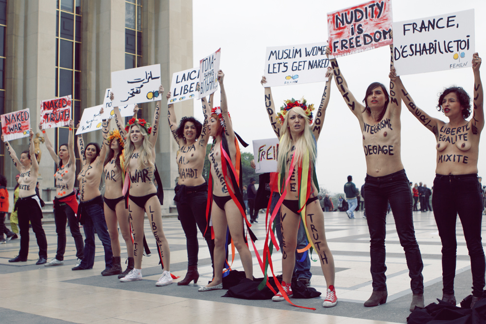 Femen à Paris 31 mars 2012.